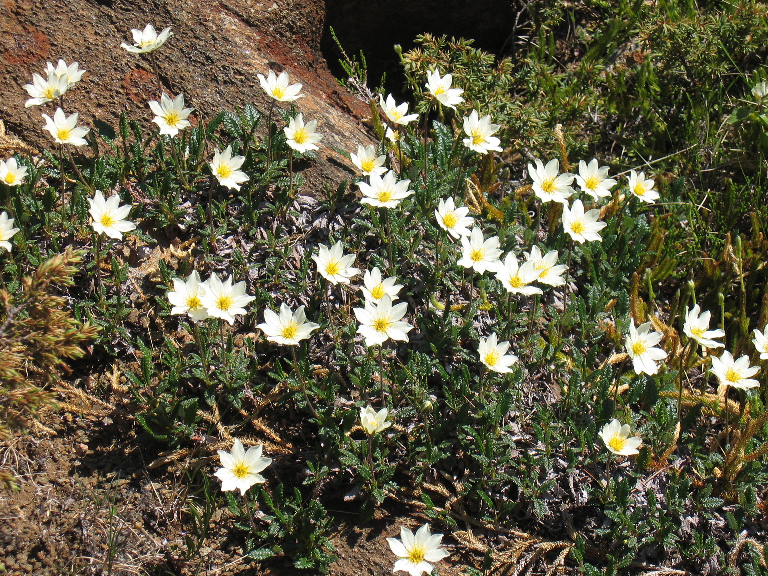 Reinrose (Dryas octopetala)